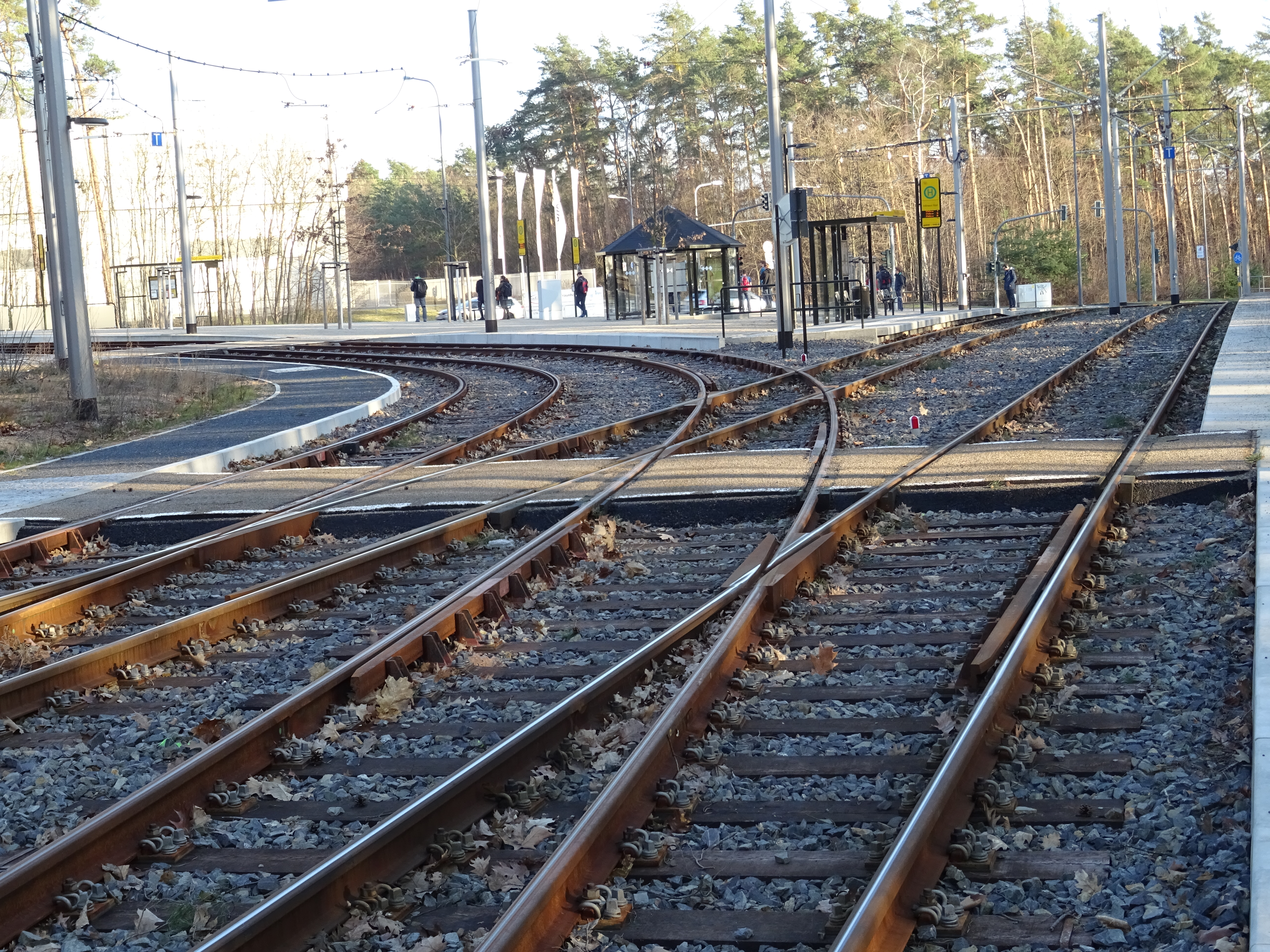 Dresden.neue Gleisschleife am Abzweig Hellerau. Gleisschleife an der Haltestelle „Infineon Süd“. Sie soll die bisherige Wendemöglichkeit in Höhe Diebsteig ersetzen